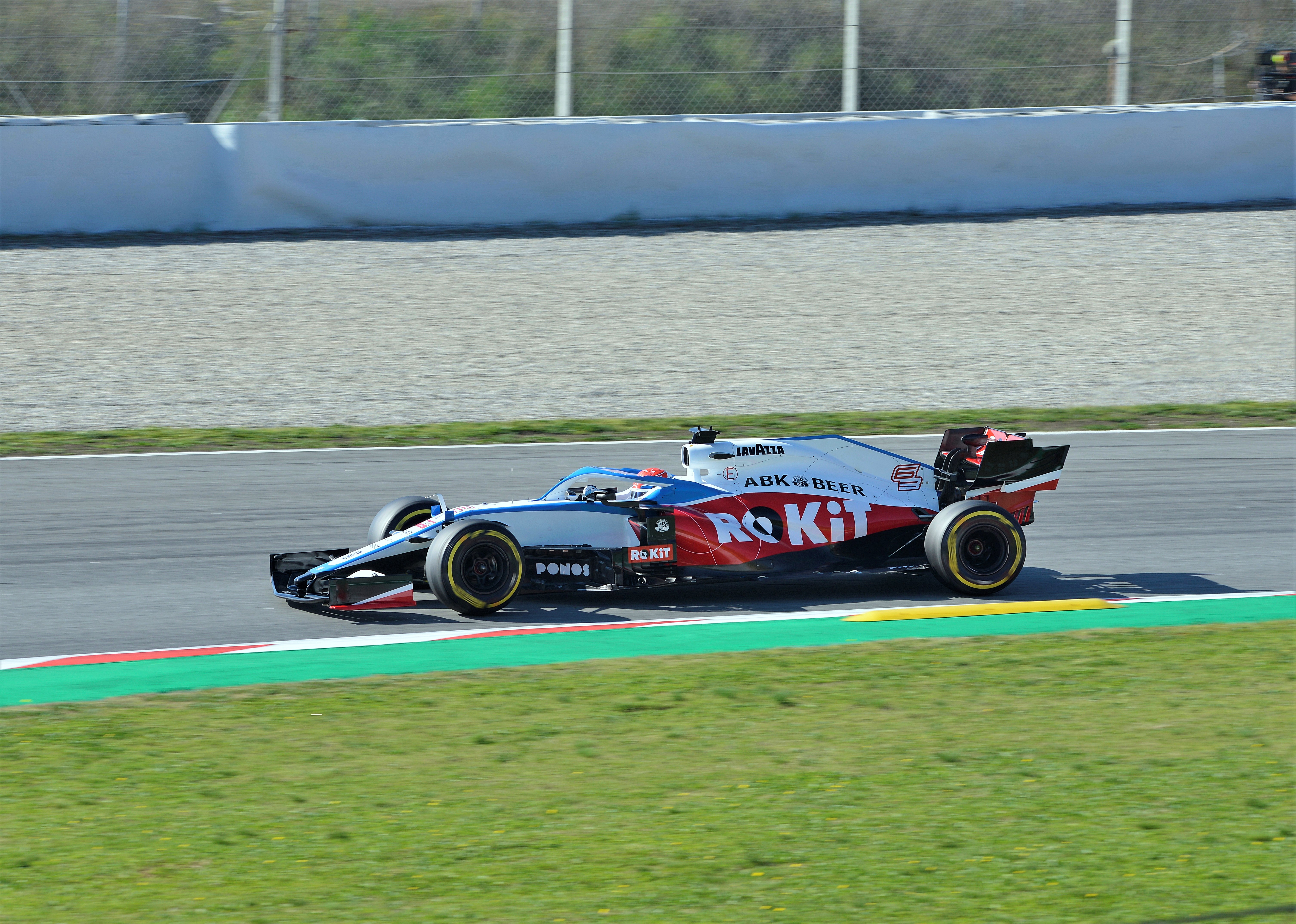 Test Days F1 2020